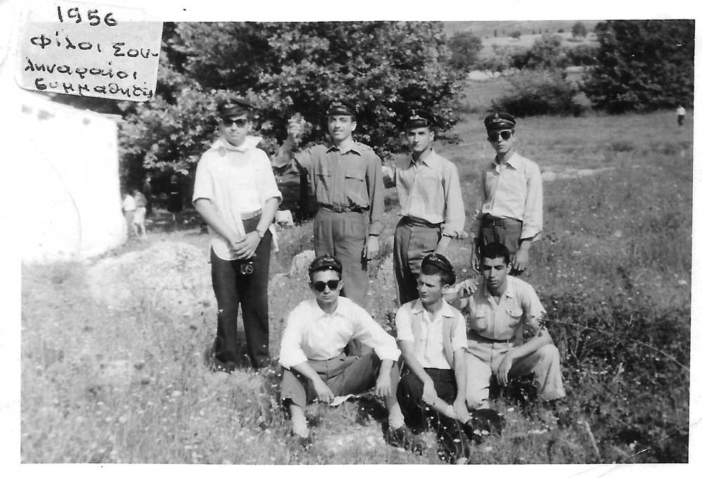 1955. Γυμνασιόπαιδες Σουλιναρίου εκείνης της εποχής.